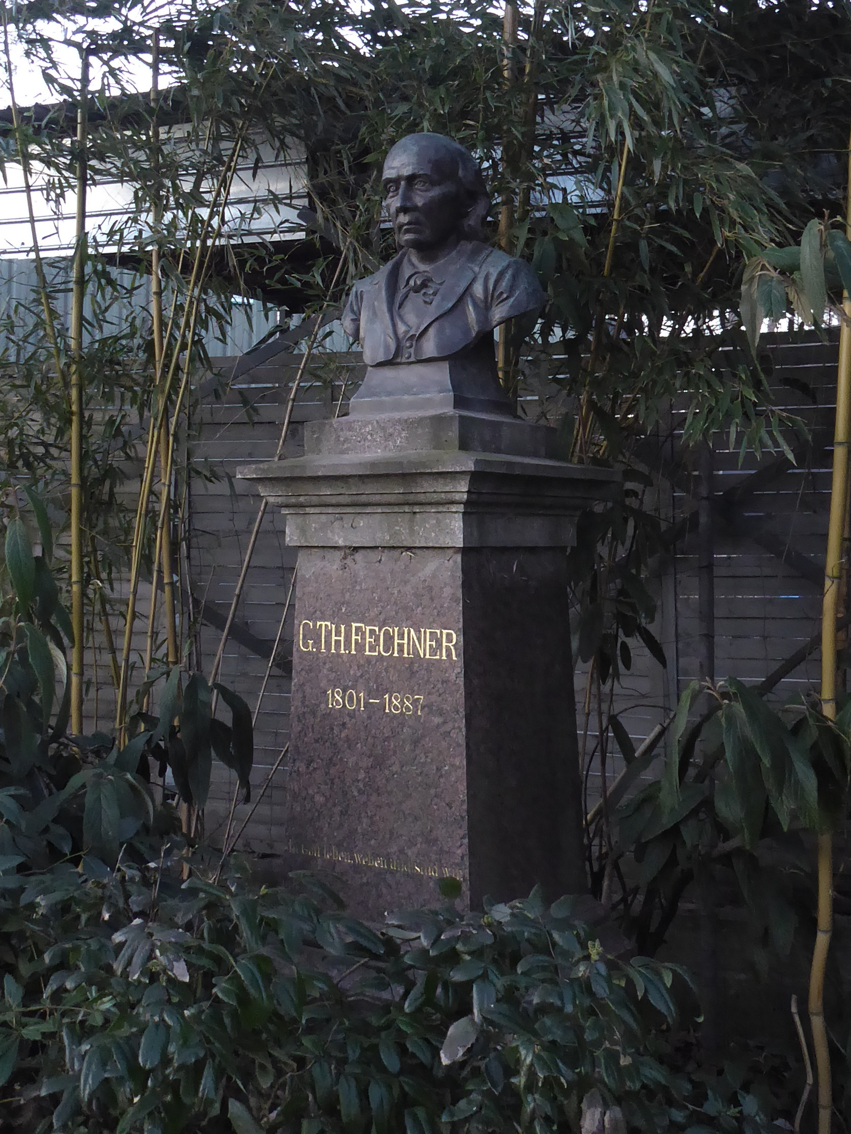 Fechner-Denkmal am Zoo Leipzig